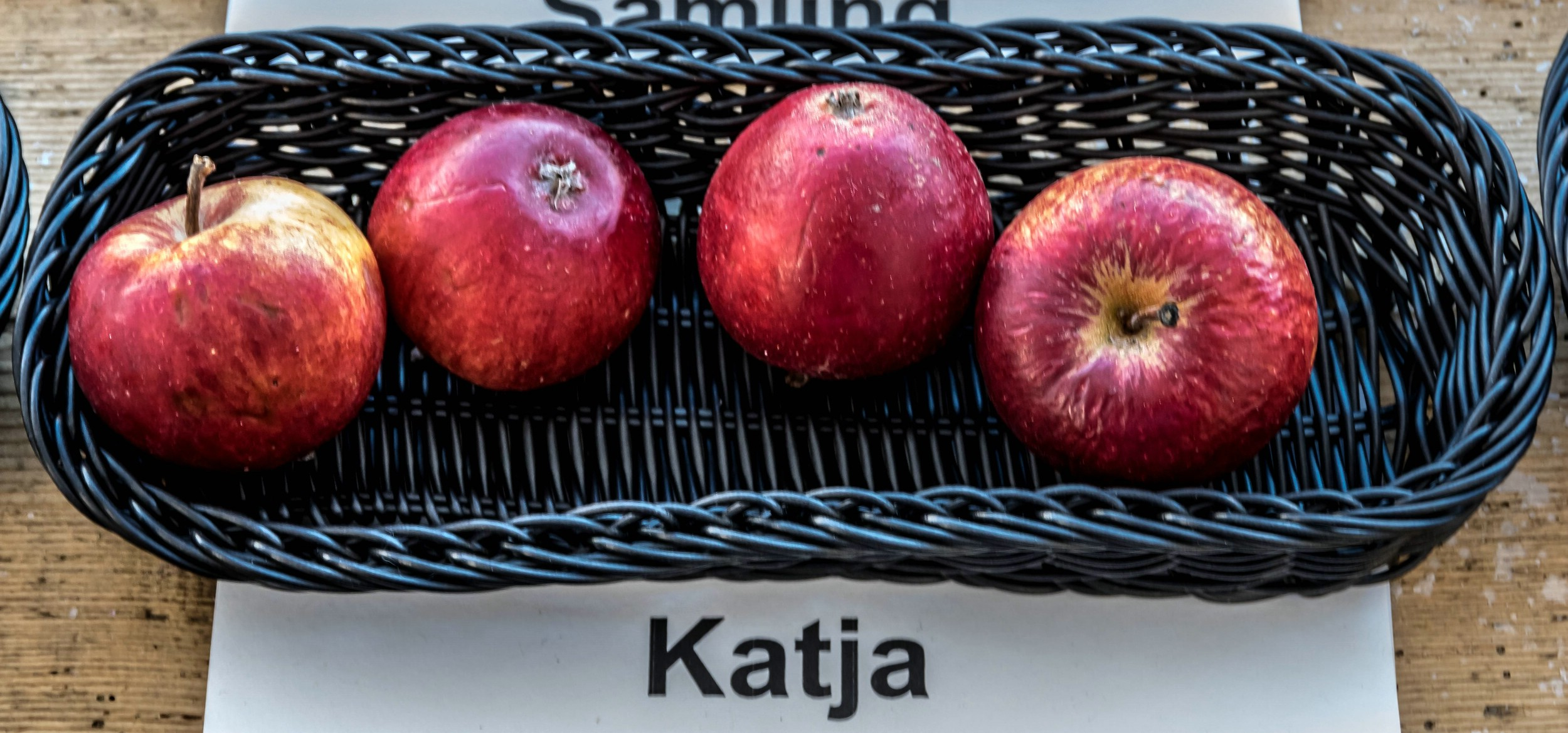 Alte Apfelsorten, von denen es im Badischen noch tragende Bäume gibt. Alle Aufnahmen au dem Oktober 2015